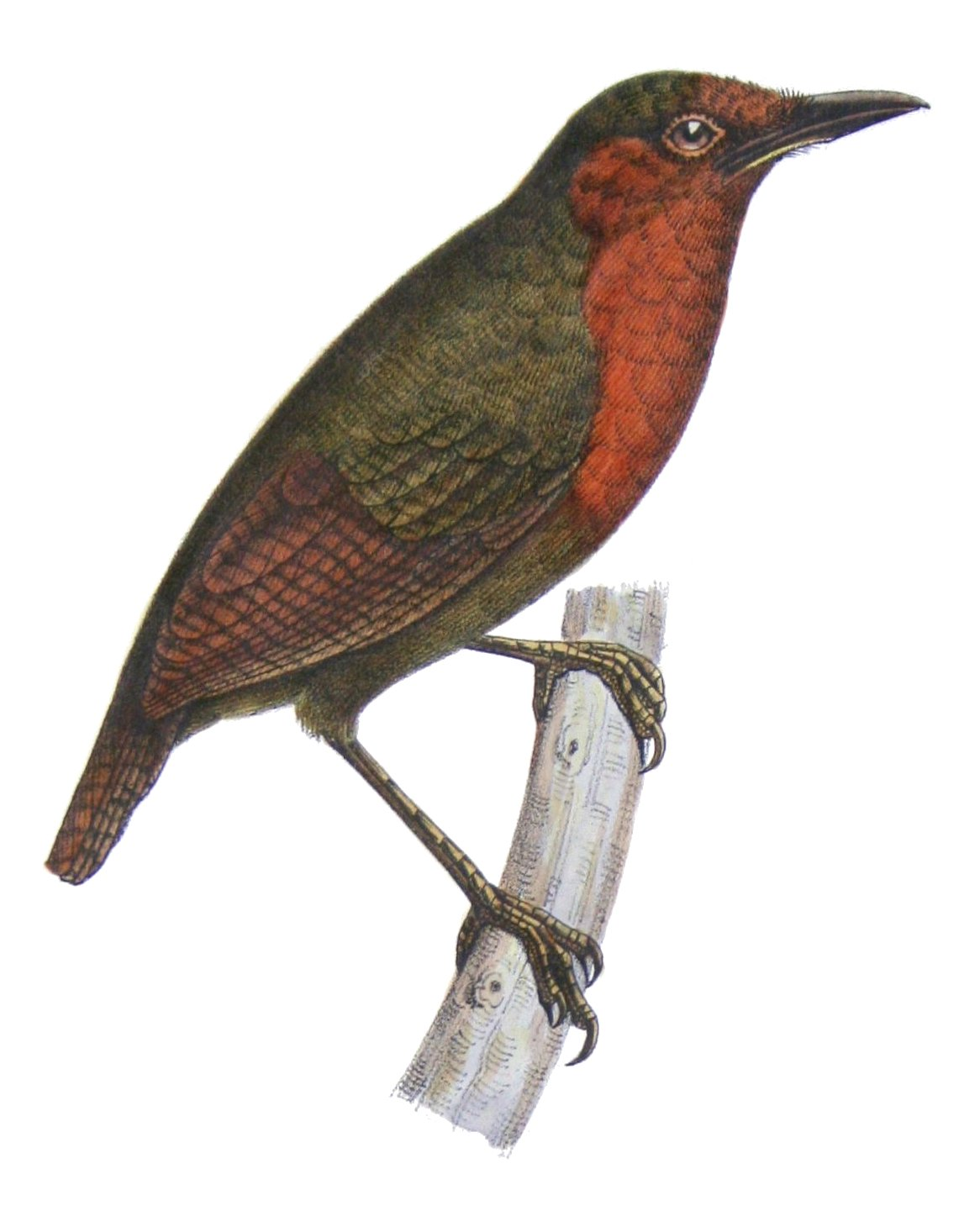 Saracholinus rufigularis O. Des M. = Sclerurus rufigularis Pelzeln, 1868